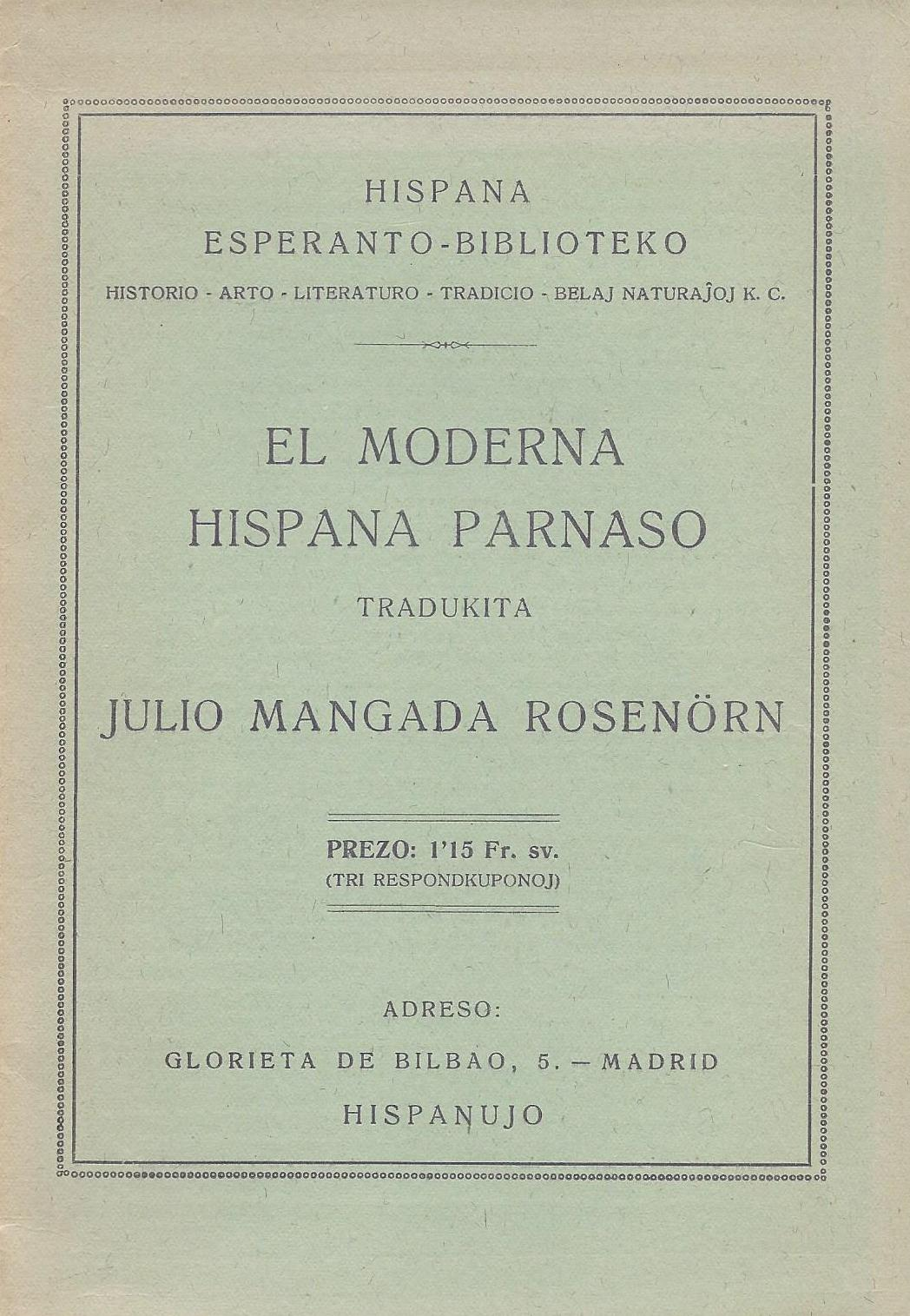 librokovrilo de "El Moderna Hispana Parnaso", 1923